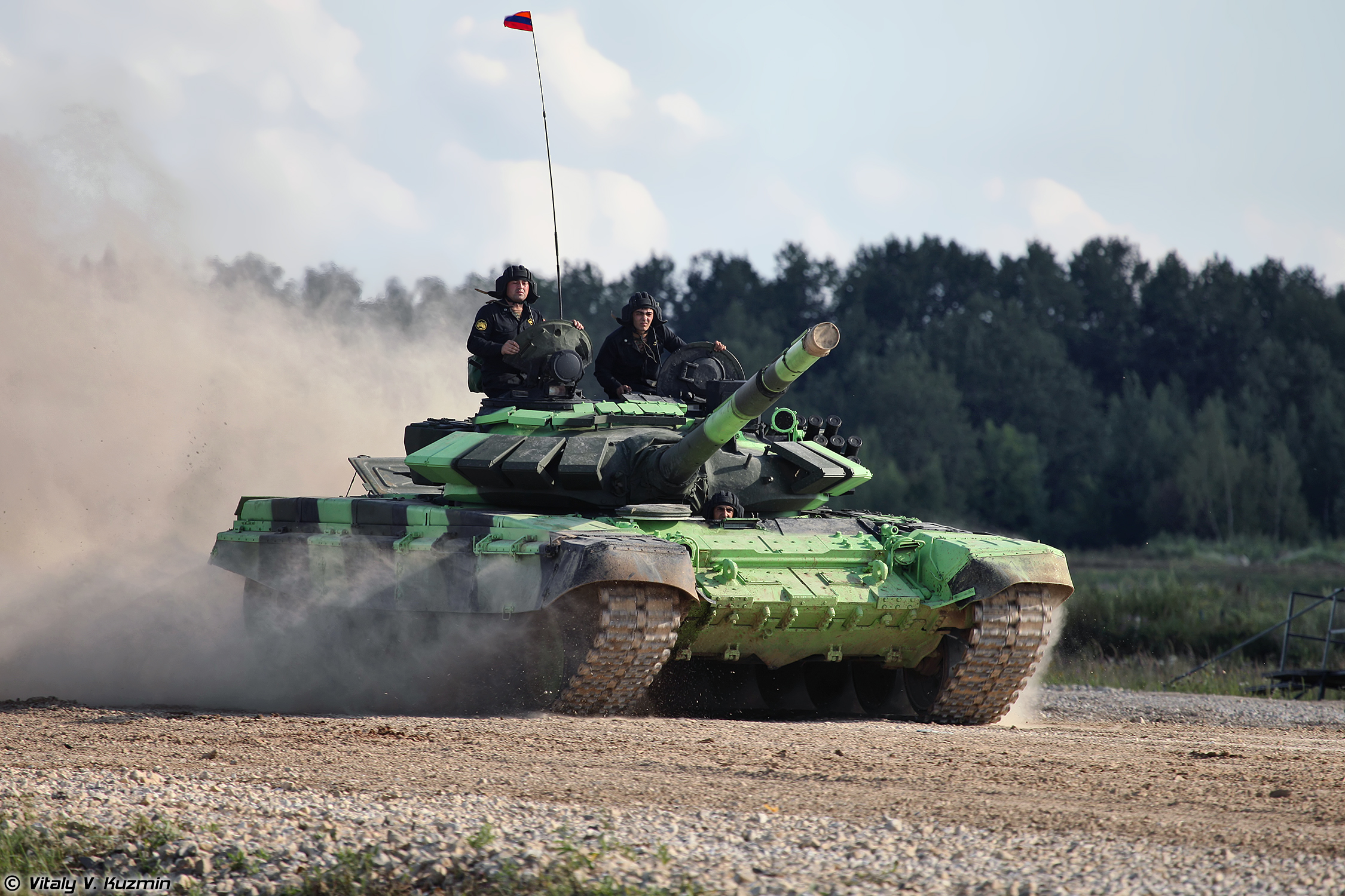 Т-72Б3 Армения (T-72B3 Armenia)